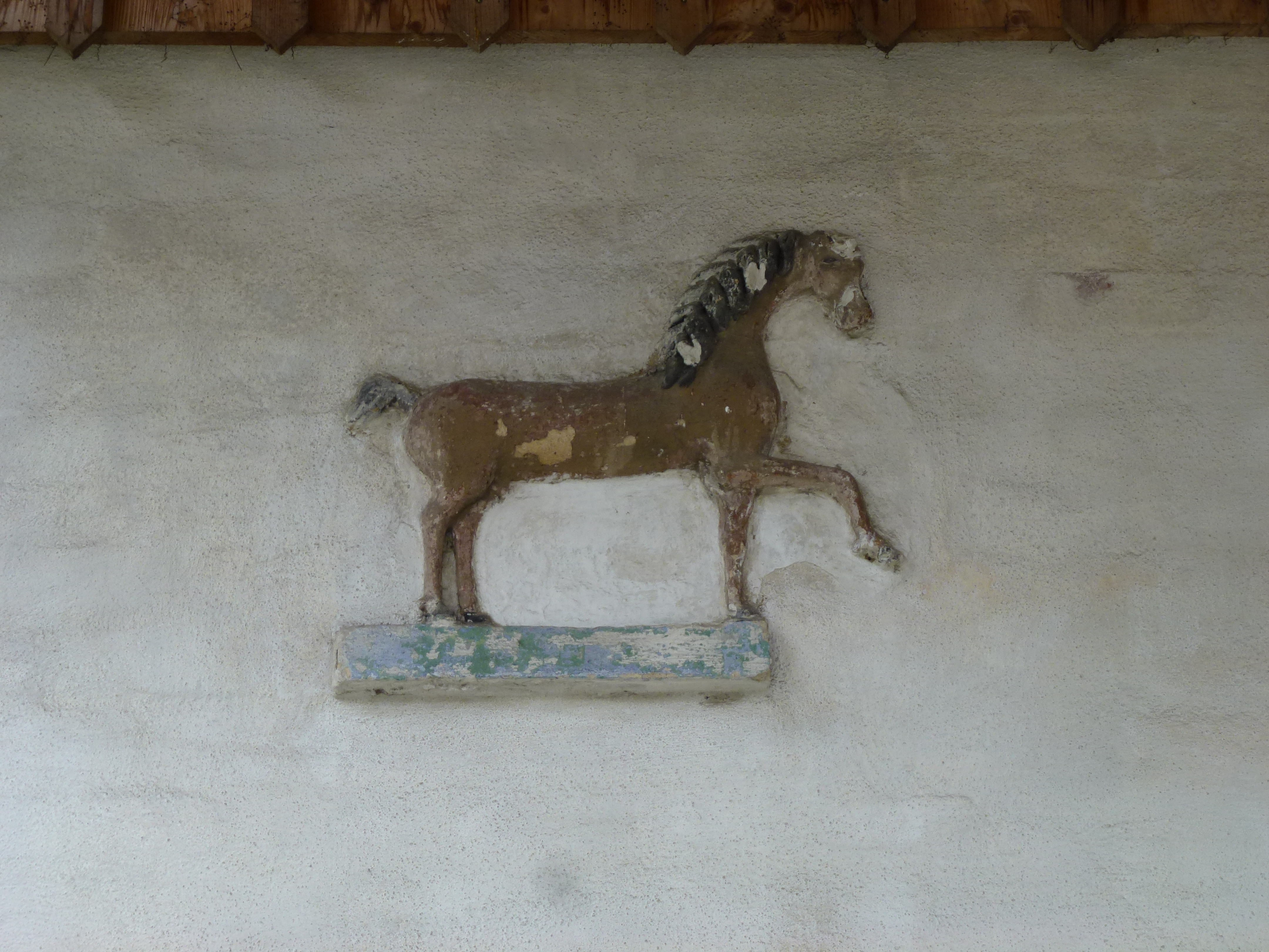 Weichs, Freiherrnstr.2: Mörtelplastik links: Pferd